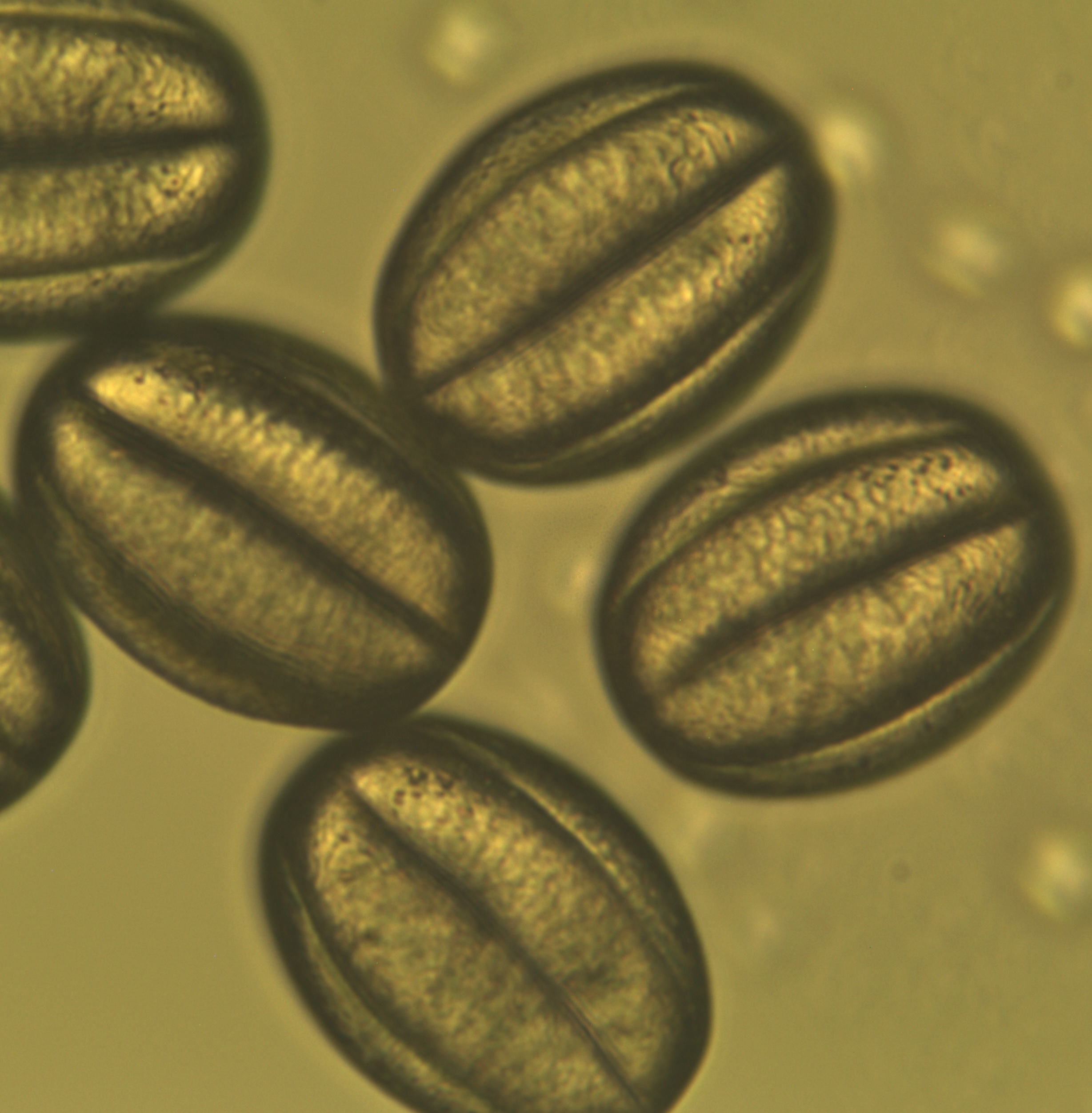 Pollen der Echten Katzenminze (400x)